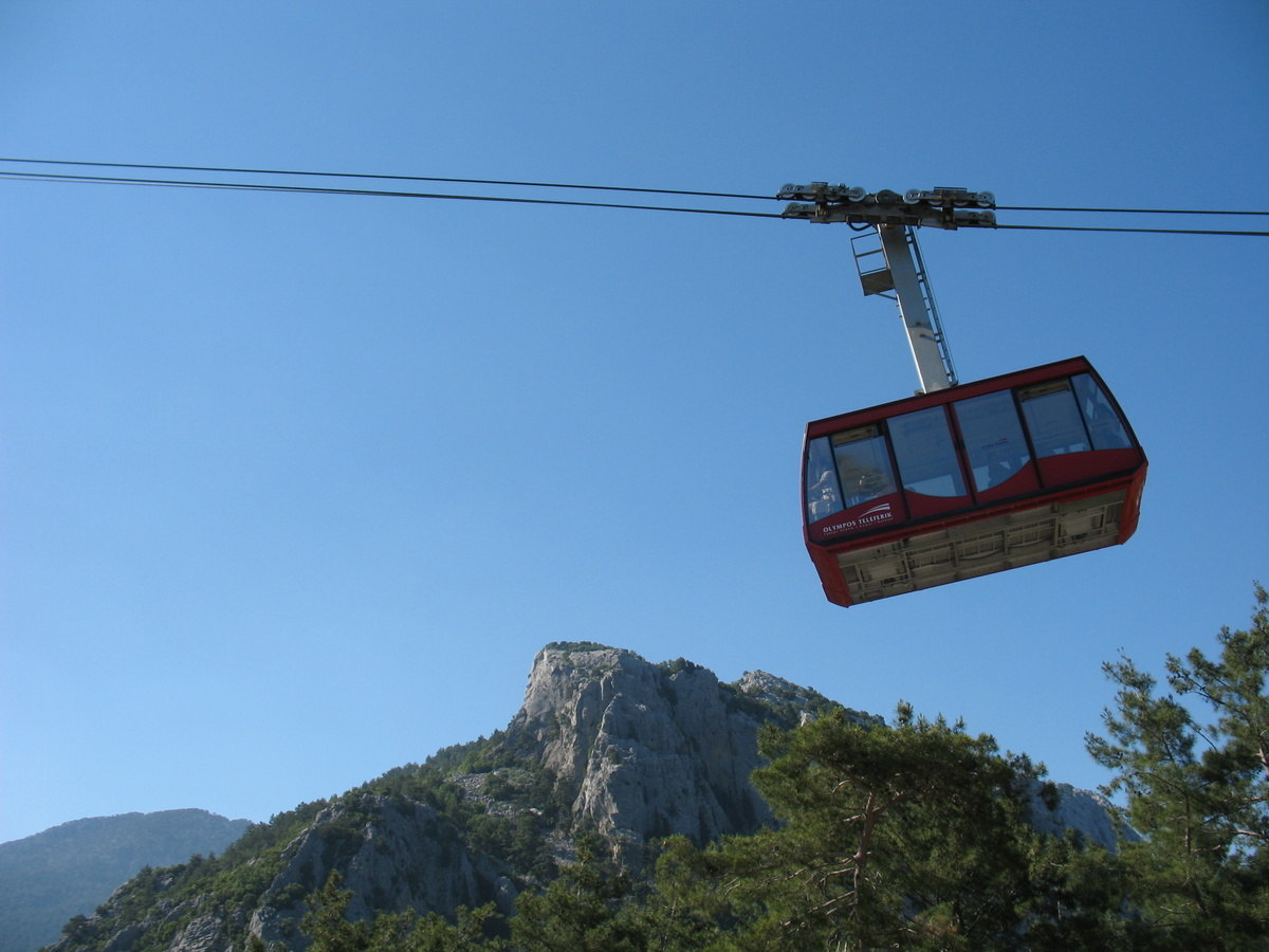 Tahtalı mountain. Тахталы